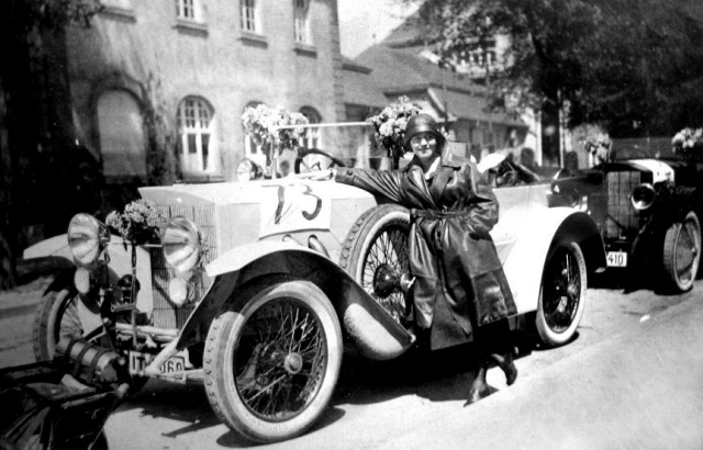 Steiger Typ 10/55 PS Tourenwagen